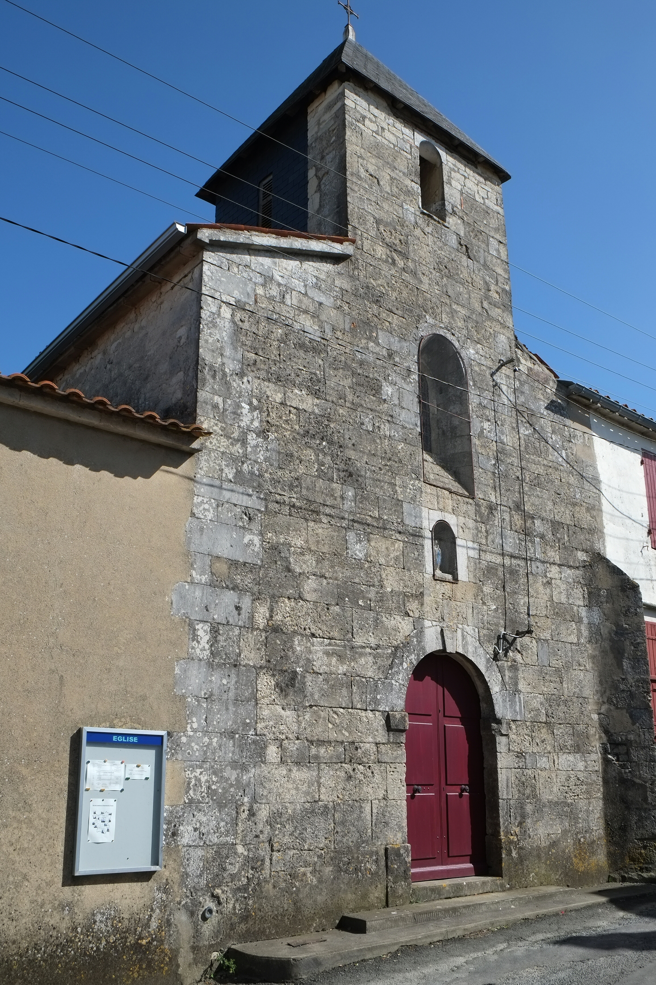 Église Croix-Chapeau Charente-Maritime France